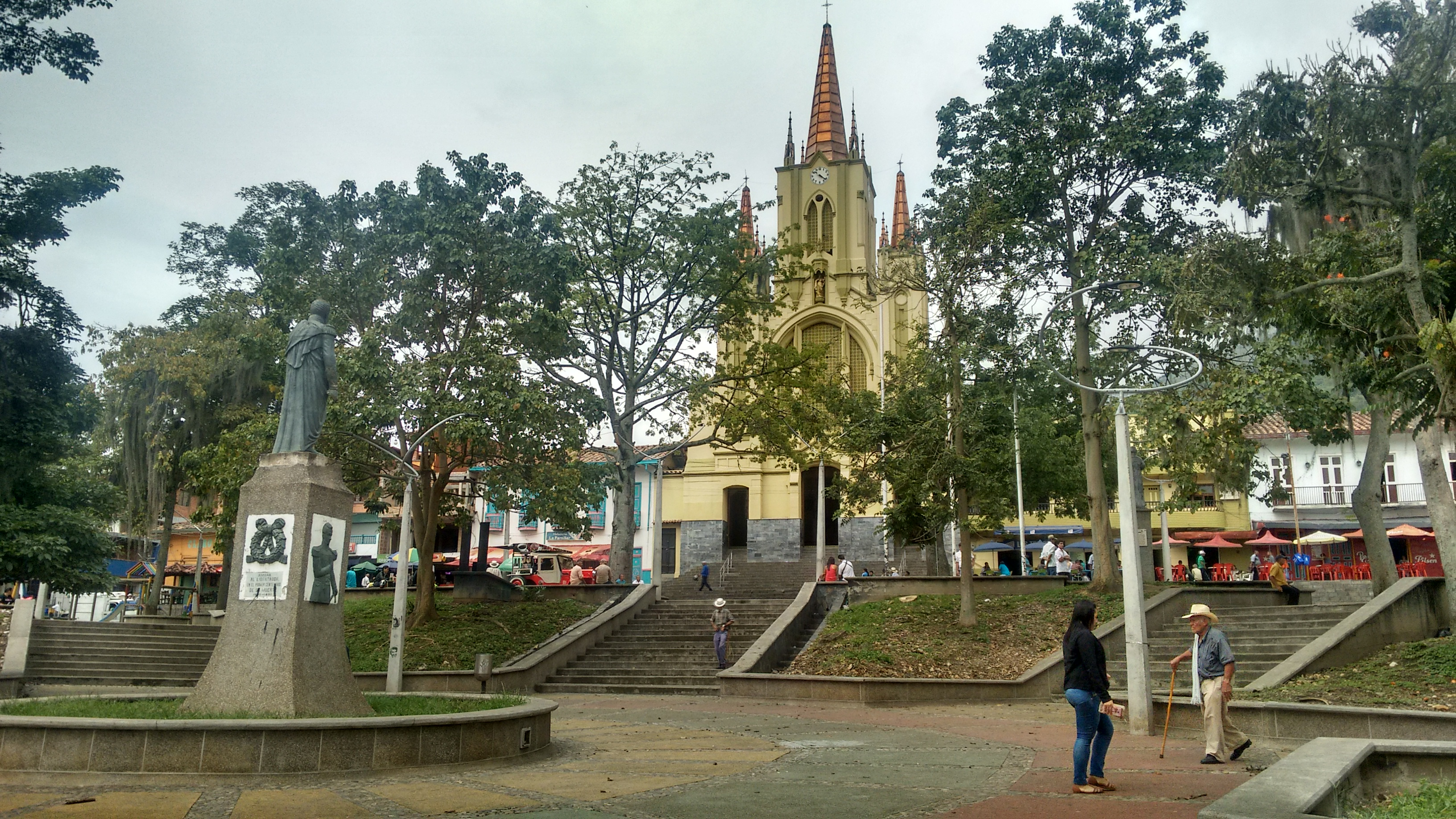 Parque Emiro Kastos.